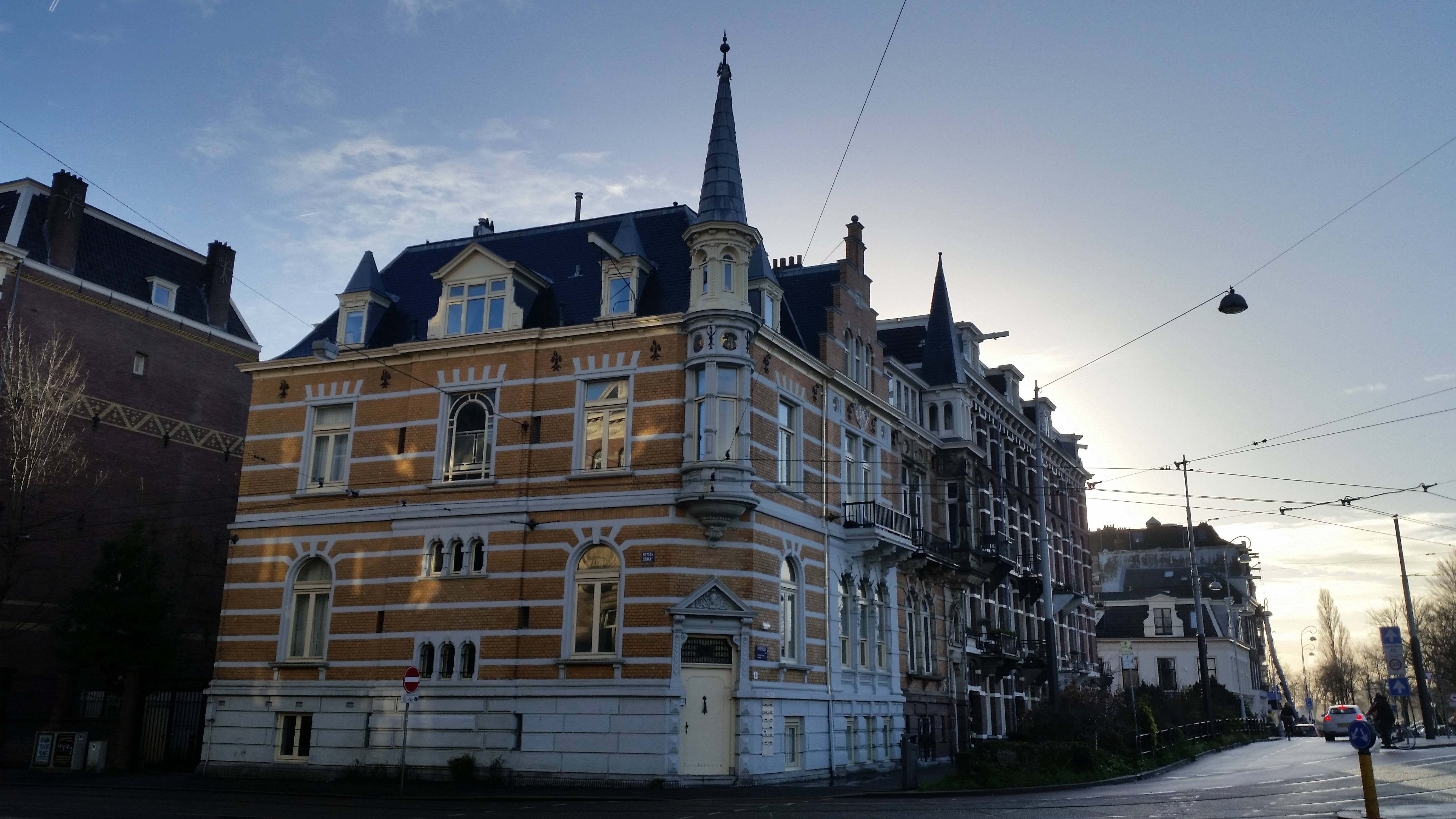 Huizenblok Weesperzijde 33-38 tussen de Ruyschstraat (links) en Blasiusstraat (rechts)